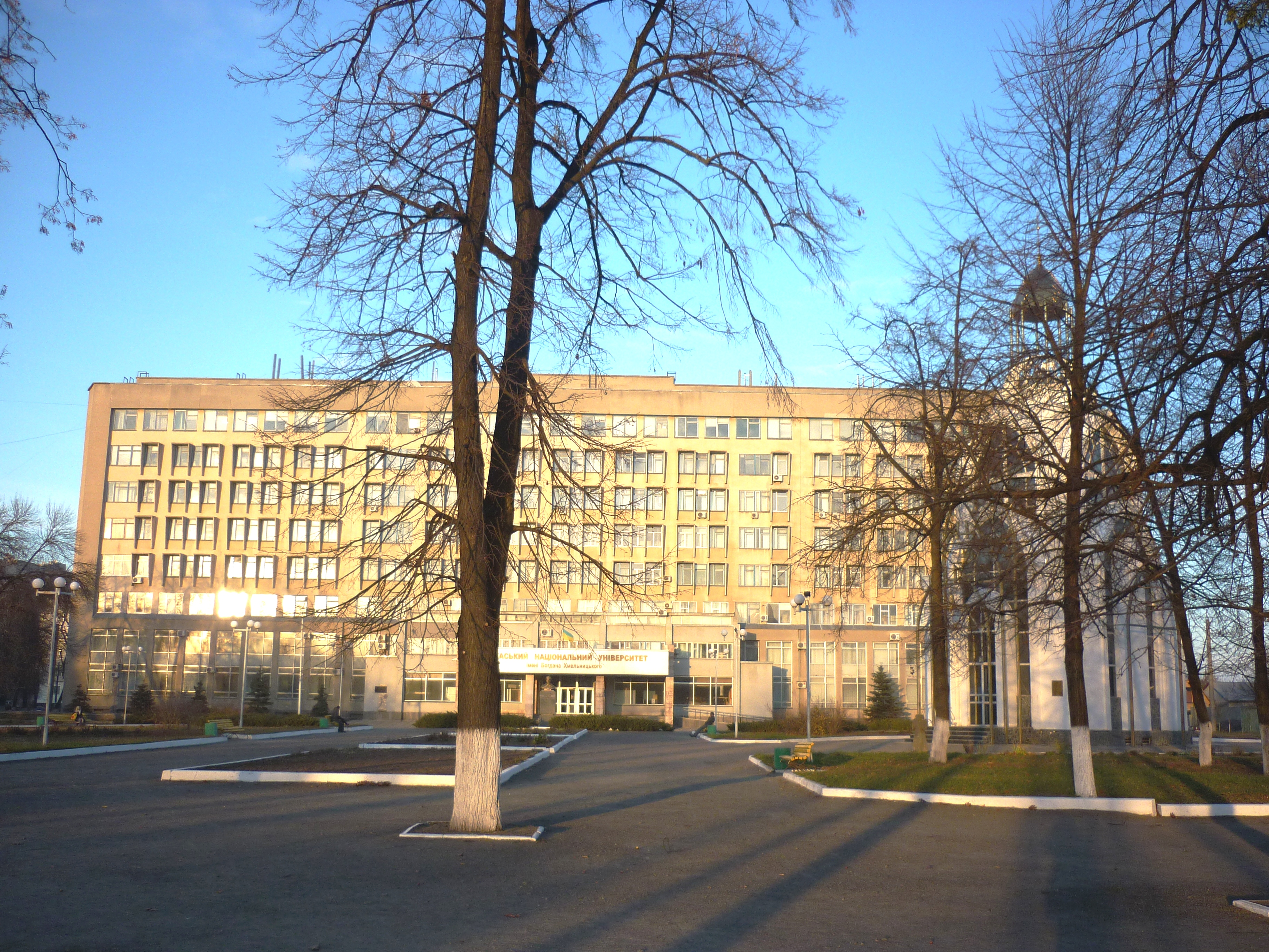 Головний корпус ЧНУ